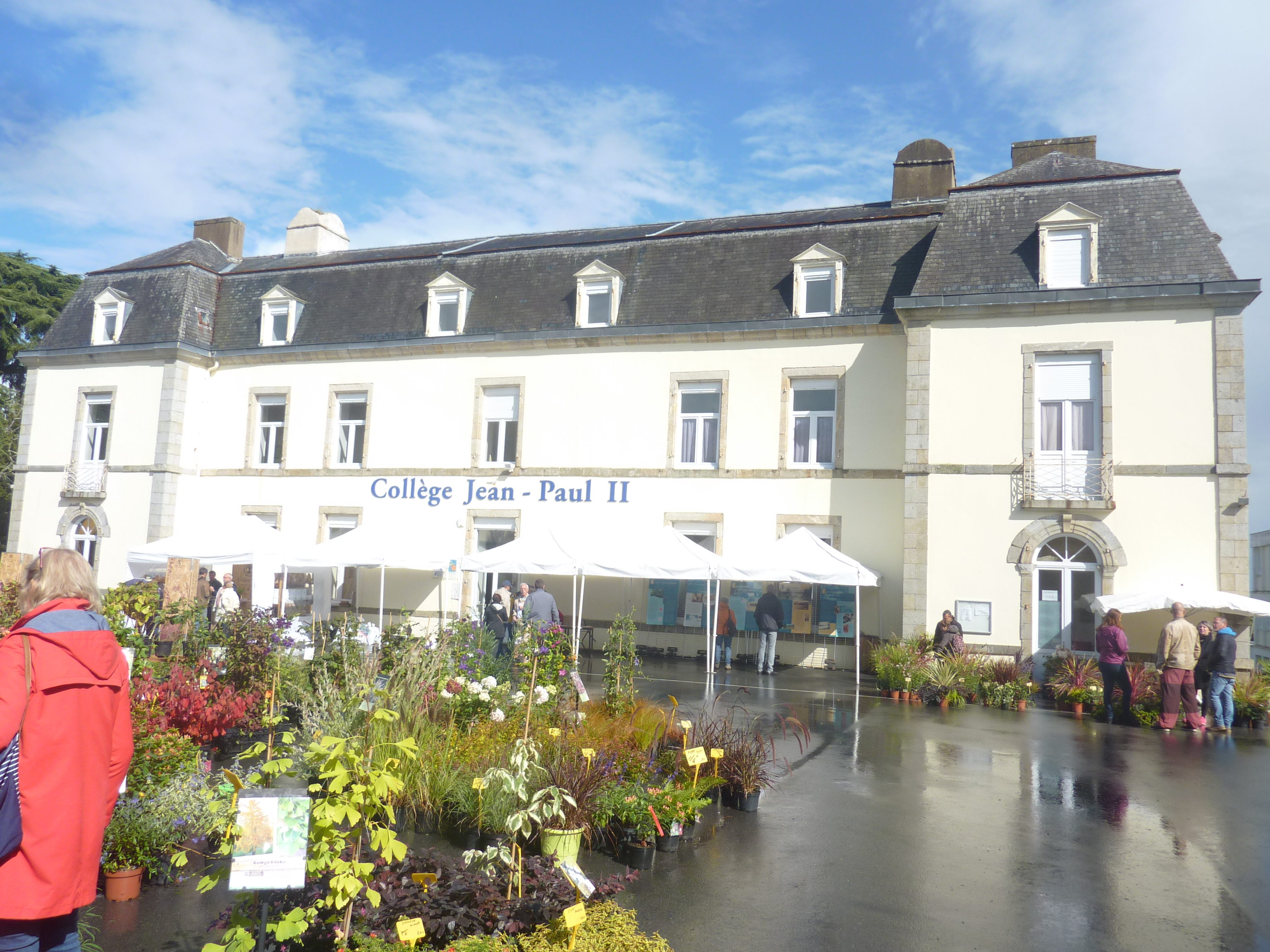 Ploemeur : le château du Ter (actuel collège privé Jean-Paul II) un jour de fête des plantes.